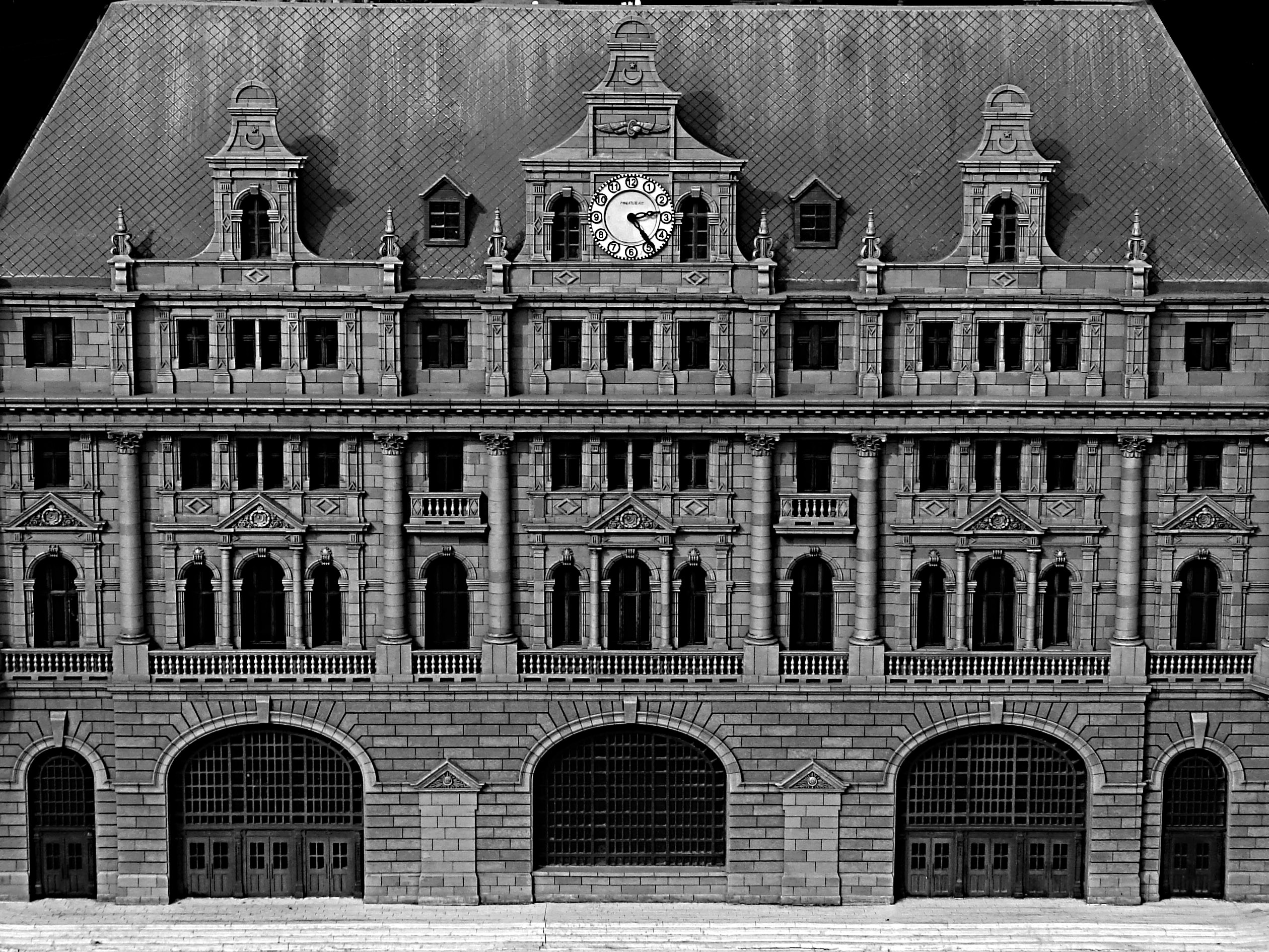 Haydarpasa Miniaturk